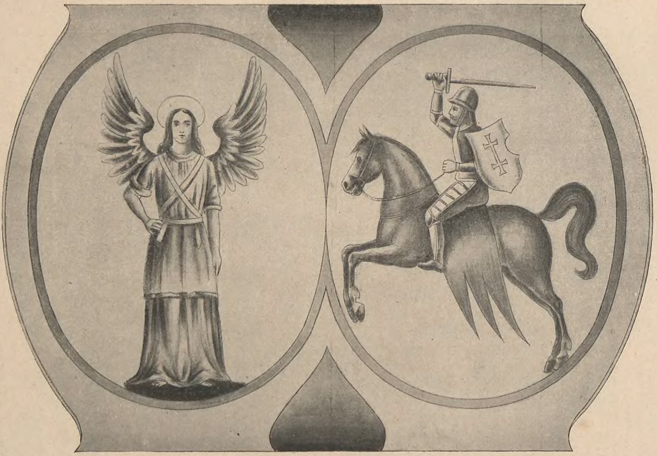 Беларуская (тарашкевіца): Герб Наваградзкага ваяводзтва (Navahradak) з Пагоняй (Pahonia)